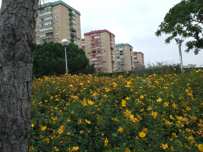 Foto del barri de Gornal (L'Hospitalet del Llobregat)